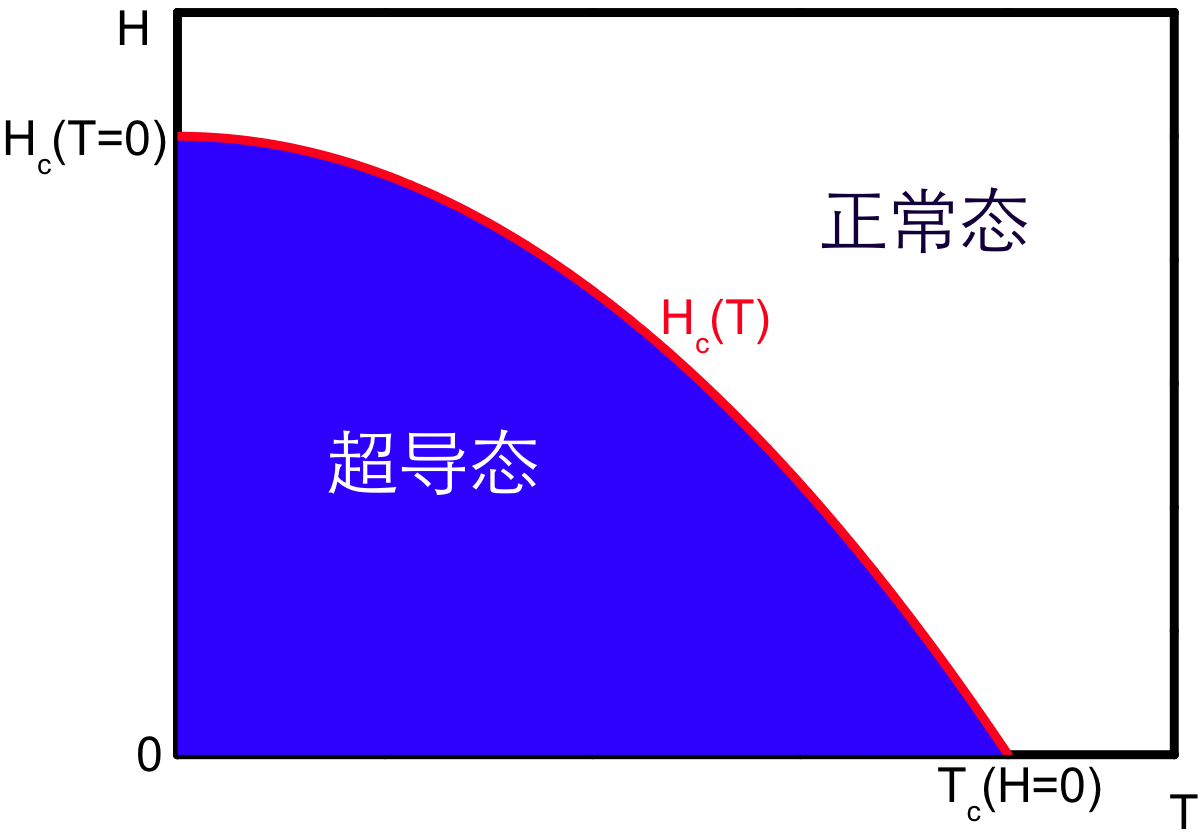 超导相图 制作者：zzxiaoquan